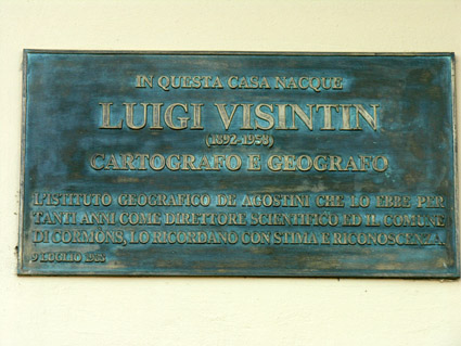 Targa sulla casa natale di Visintin a Brazzano